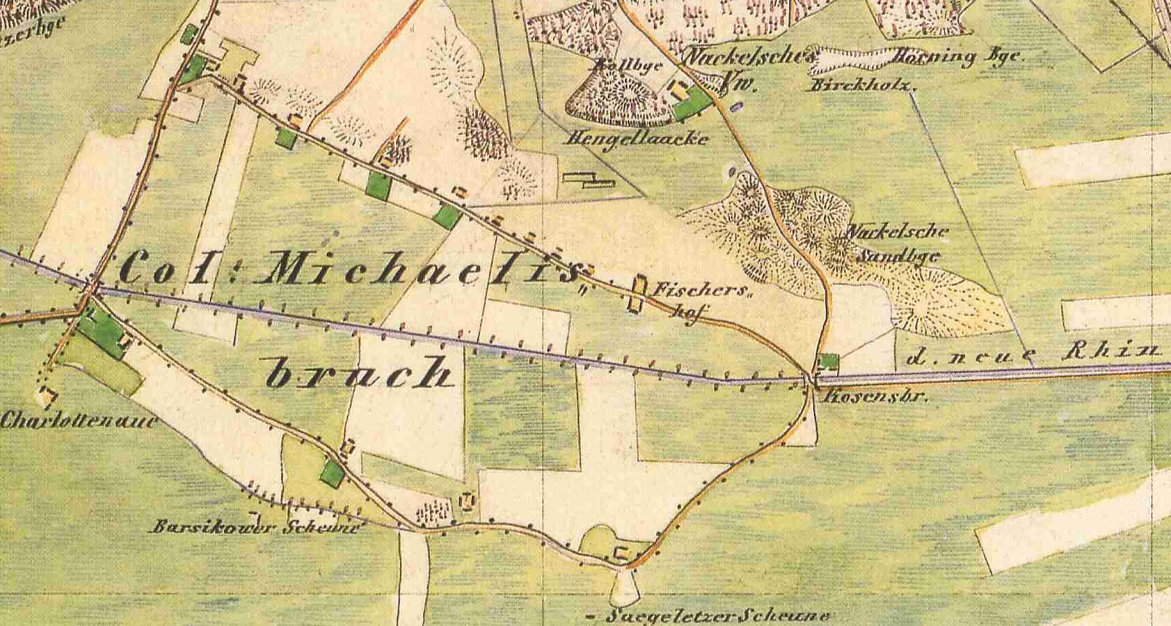 Michaelisbruch, Gemeinde Dreetz, Landkreis Ostprignitz-Ruppin, Brandenburg, Ausschnitt aus dem Urmesstischblatt 3241 Friesack von 1840